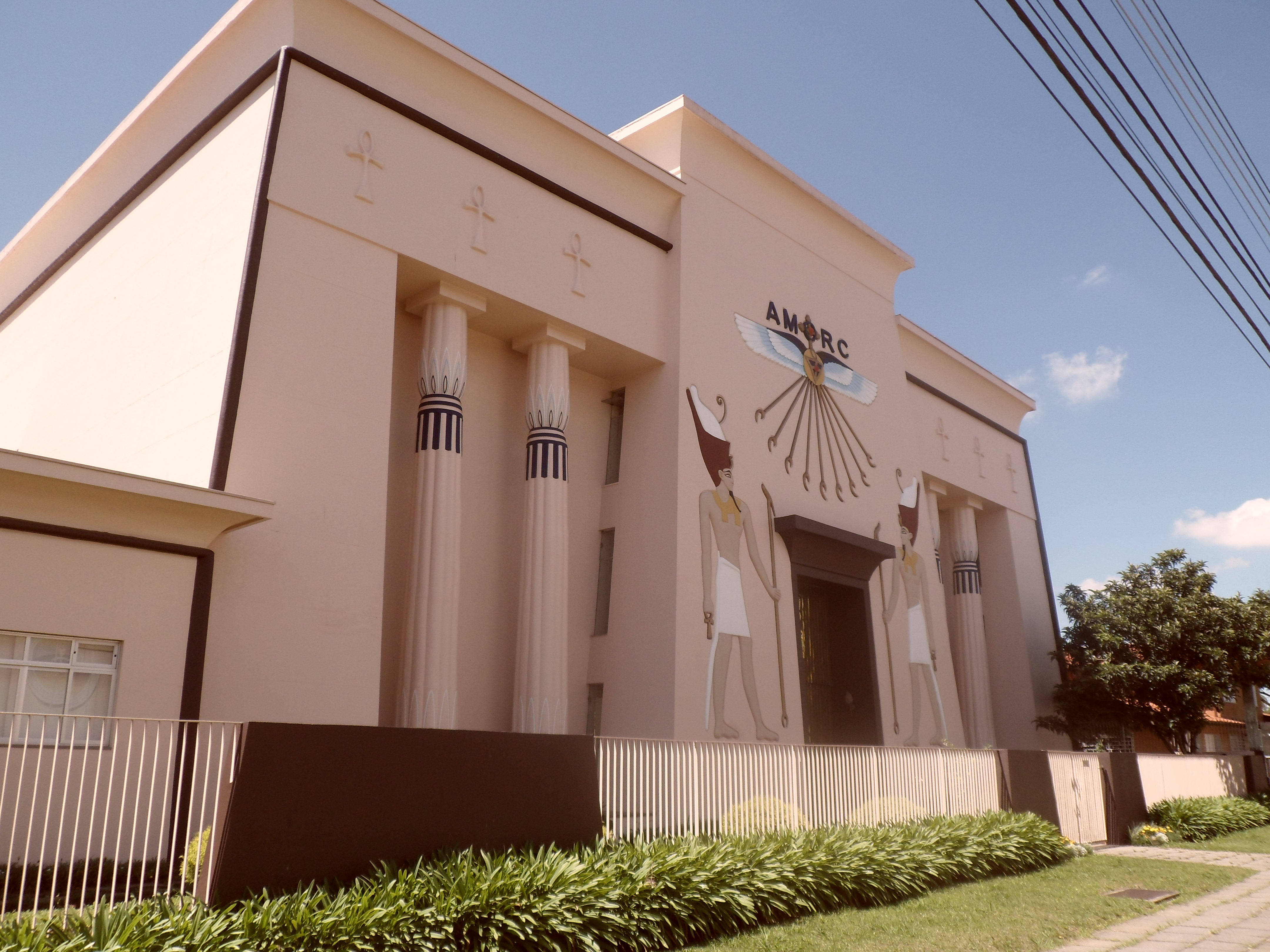 Sede da Grande Loja de Jurisdição de Língua Portuguesa da AMORC em Curitiba, Paraná, Brasil.